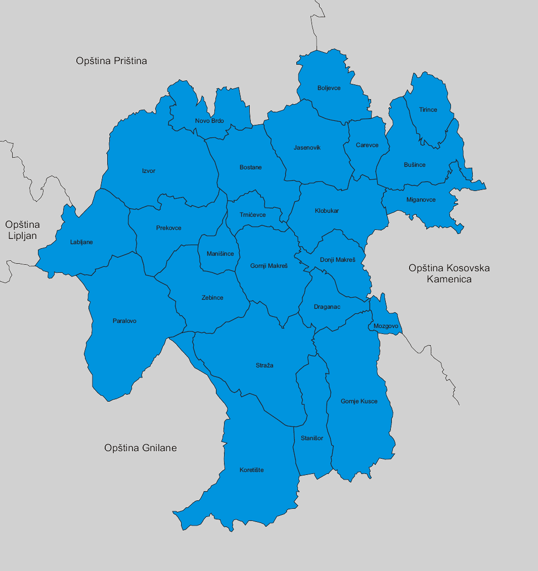 аутор Варјачић Владимир; извор: Zakon br. o3/L - 041 O ADMINISTRATIVNIM GRANICAMA OPŠTINA; Скупштина Републике Косова.